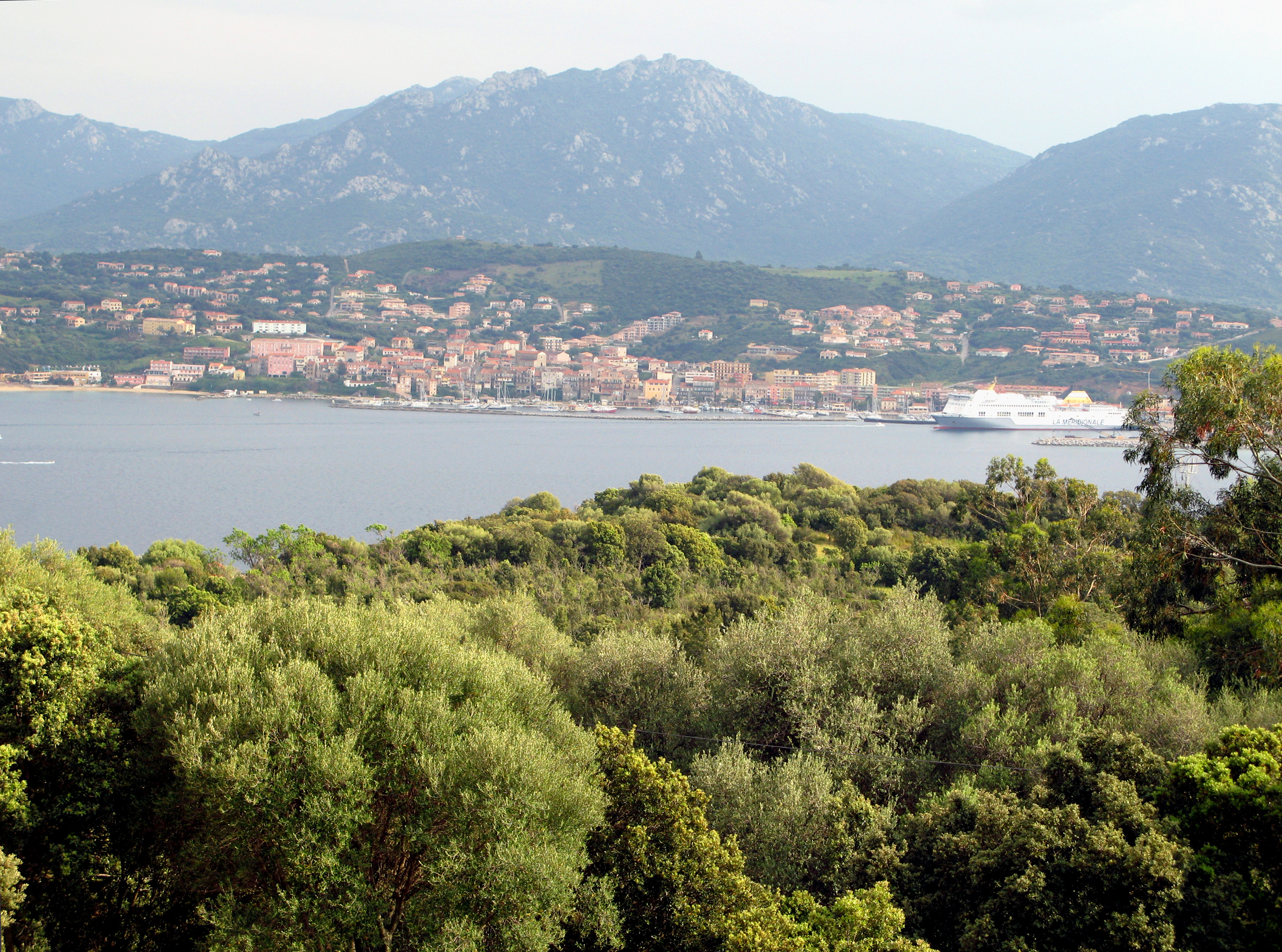 Propriano (Corse-du-Sud, France) Vue depuis le Nord, du bas-côté de la Route nationale 196, en provenance d'Olmeto. On remarque : (de gauche à droite) la petite plage du Mancinu, la ville, son port de plaisance, et plus à droite son port de commerce avec un navire de La Méridionale l'arrière-pays montagneux et boisé la végétation encore bien verte au printemps.